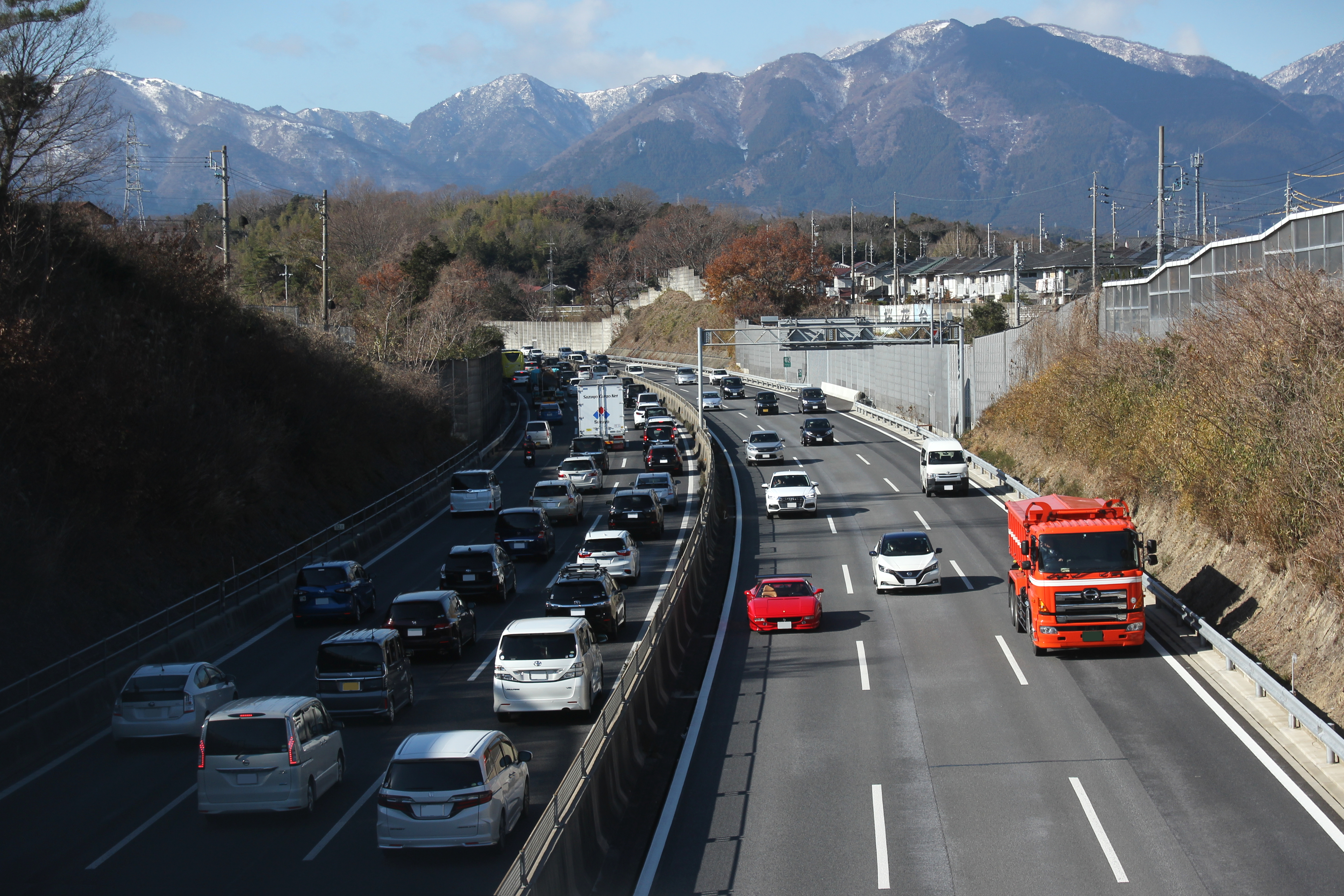 E23 東名阪自動車道 四日市インターチェンジ付近